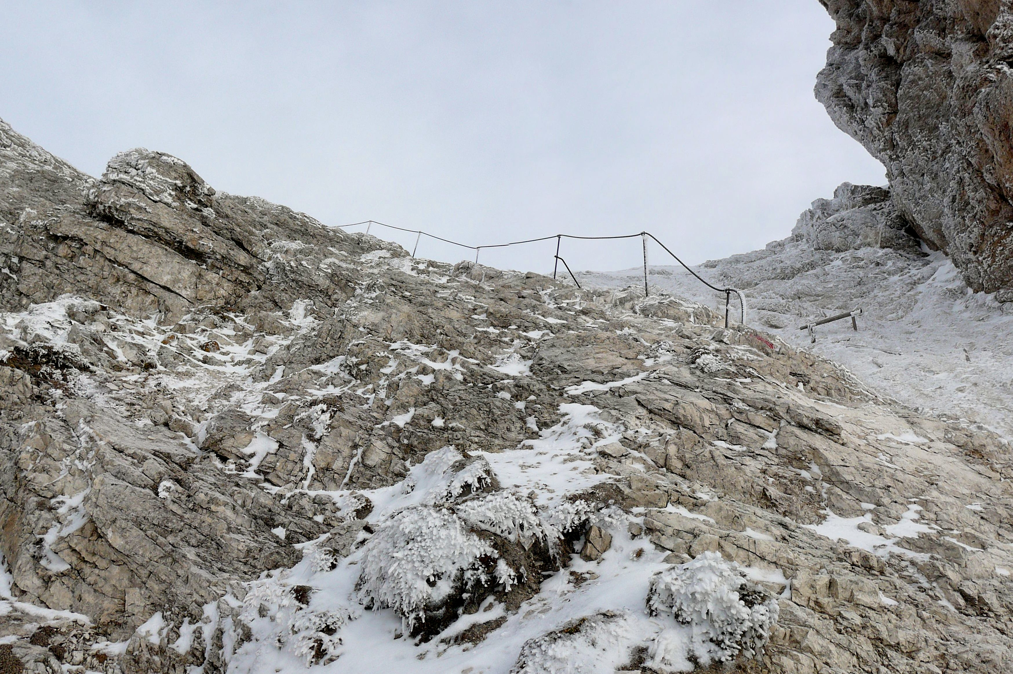 Secondo tratto atrezzato alta via GM